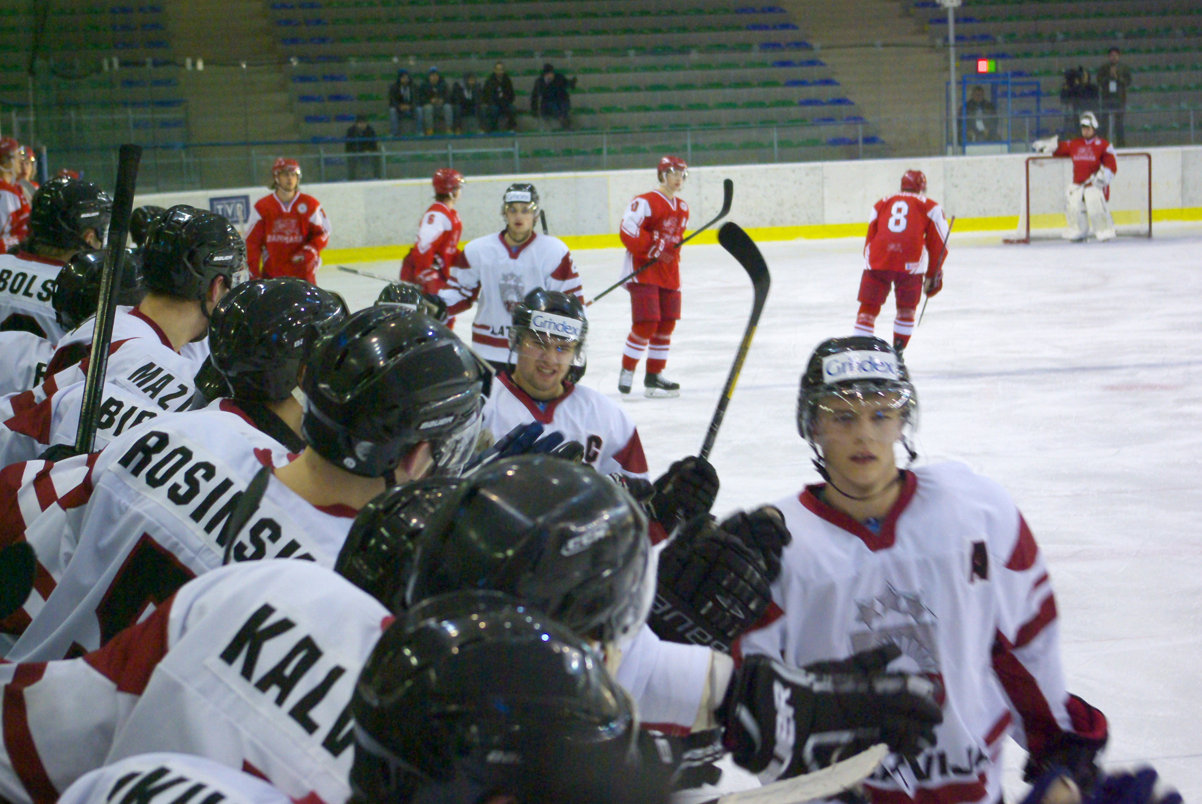 Zawodnicy Łotwy po zdobyciu gola przez Robertsa Lipsbergsa podczas Mistrzostw Świata Juniorów w Hokeju na Lodzie 2014 I Dywizji w Sanoku, Dania - Łotwa 4:1, Arena Sanok 19 grudnia 2013